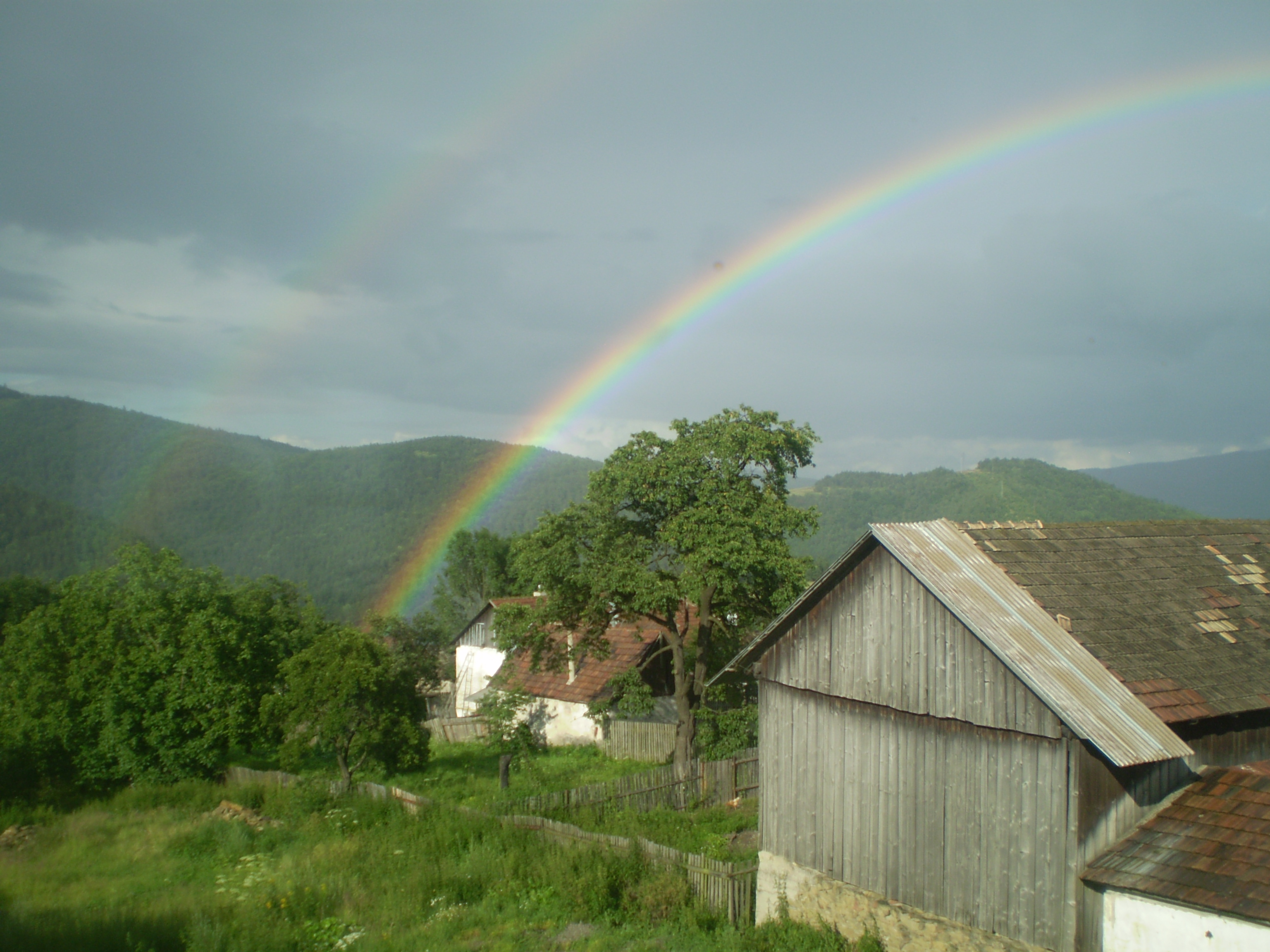 duha